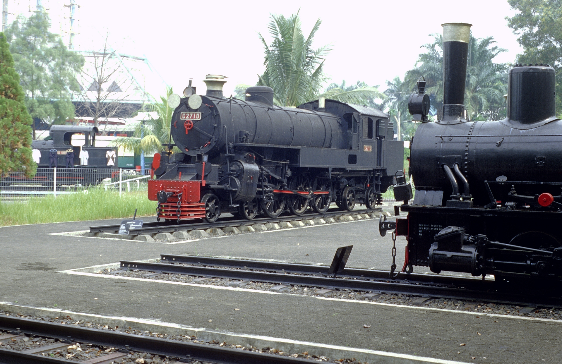 DKA C27 (C 27 10 A)